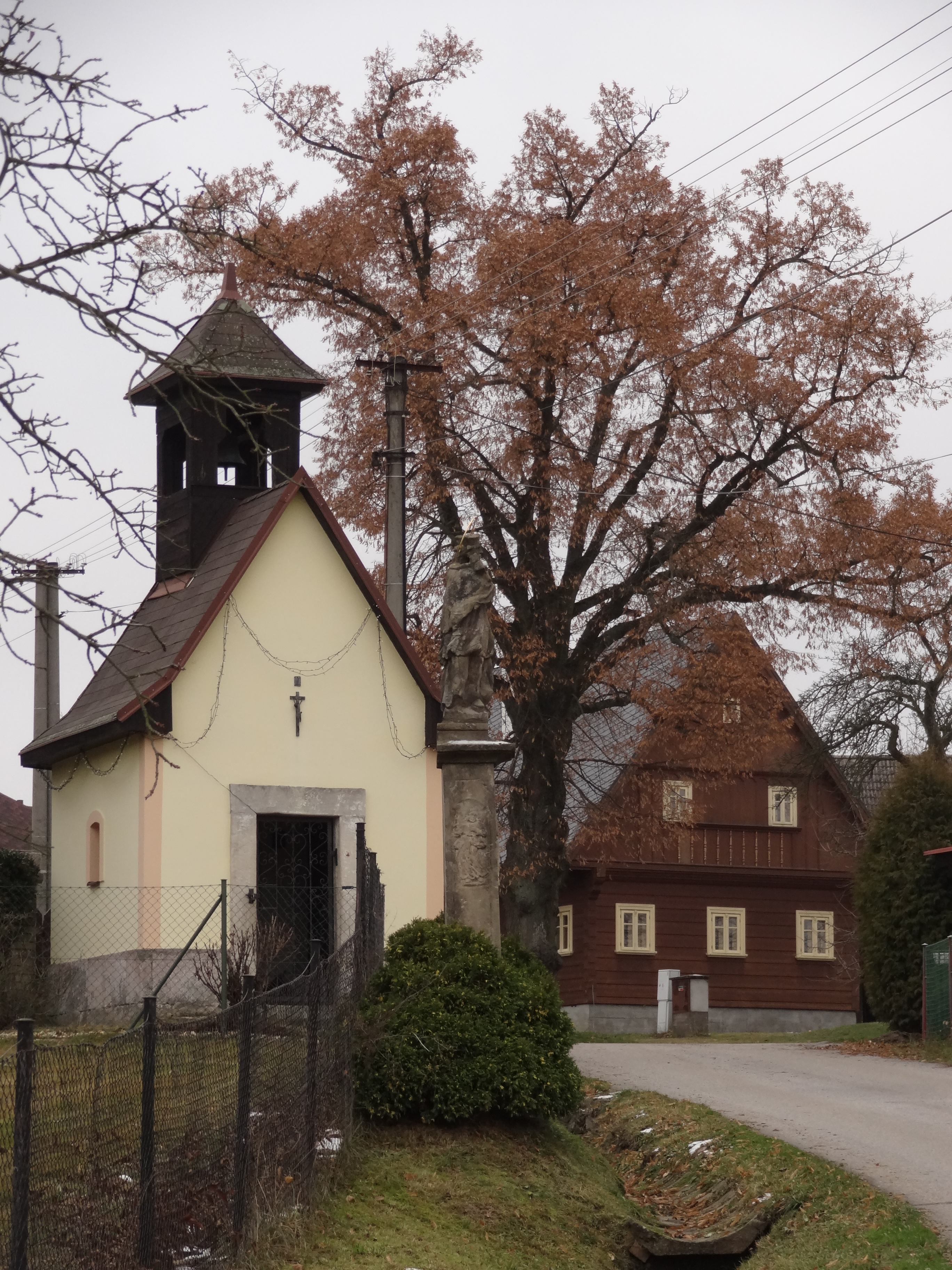 Socha svatého Jana Nepomuckého, při čp. 21, Pipice.